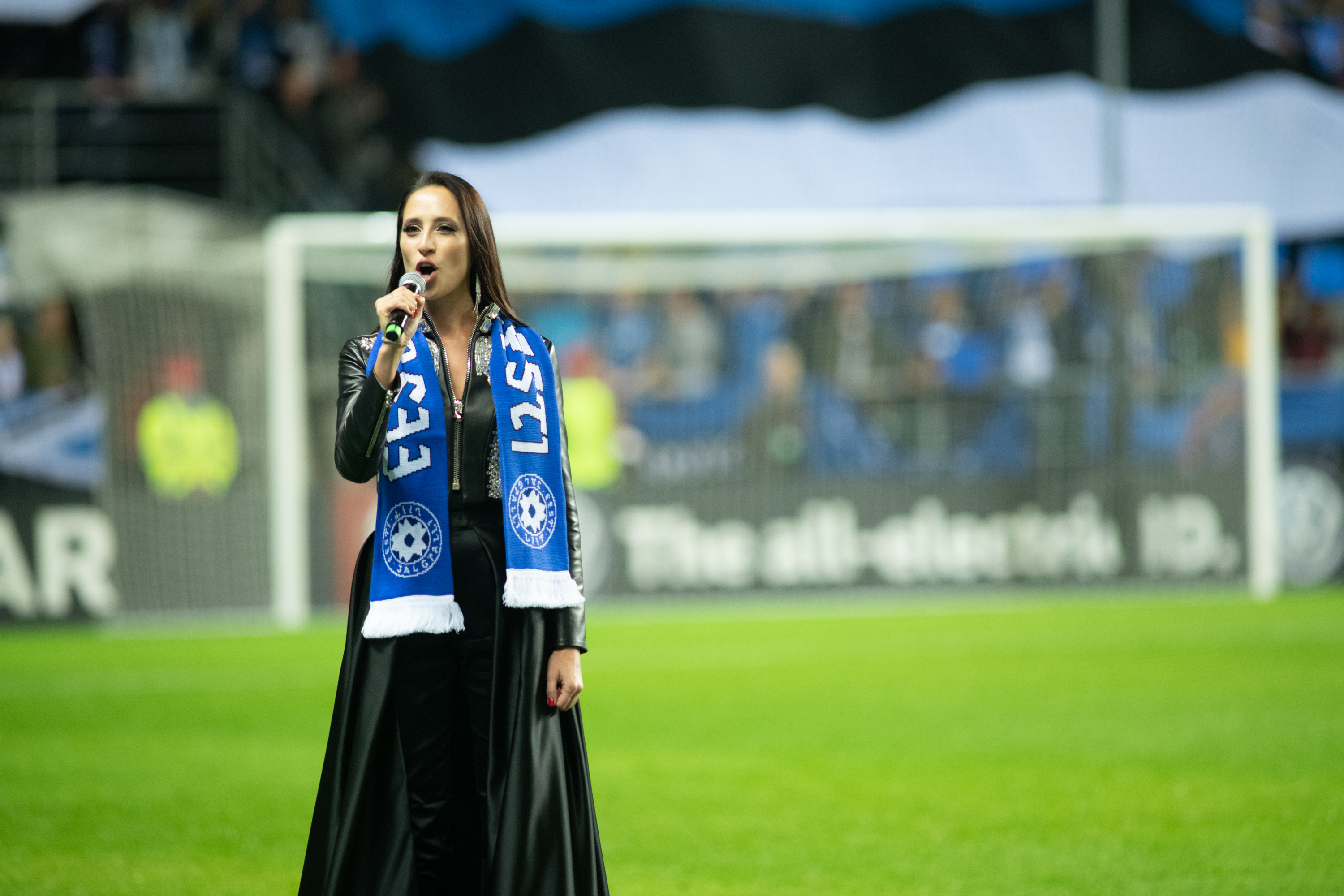 Elina Netšajeva laulmas Eesti hümni Eesti-Holland EM valikmängul